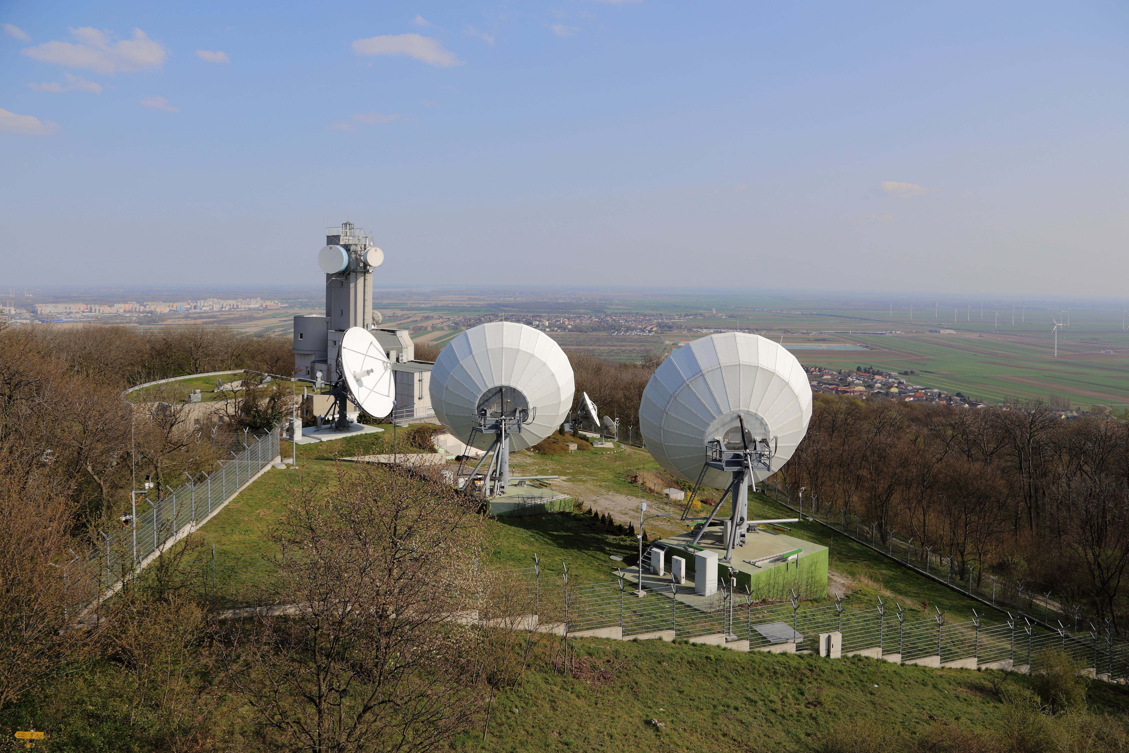 Blick vom Aussichtsturm auf der 344 Meter hohen Königswarte Richtung Osten und über die "Lauschstation", die ab 1958 mit Hilfe der USA errichtet wurde.